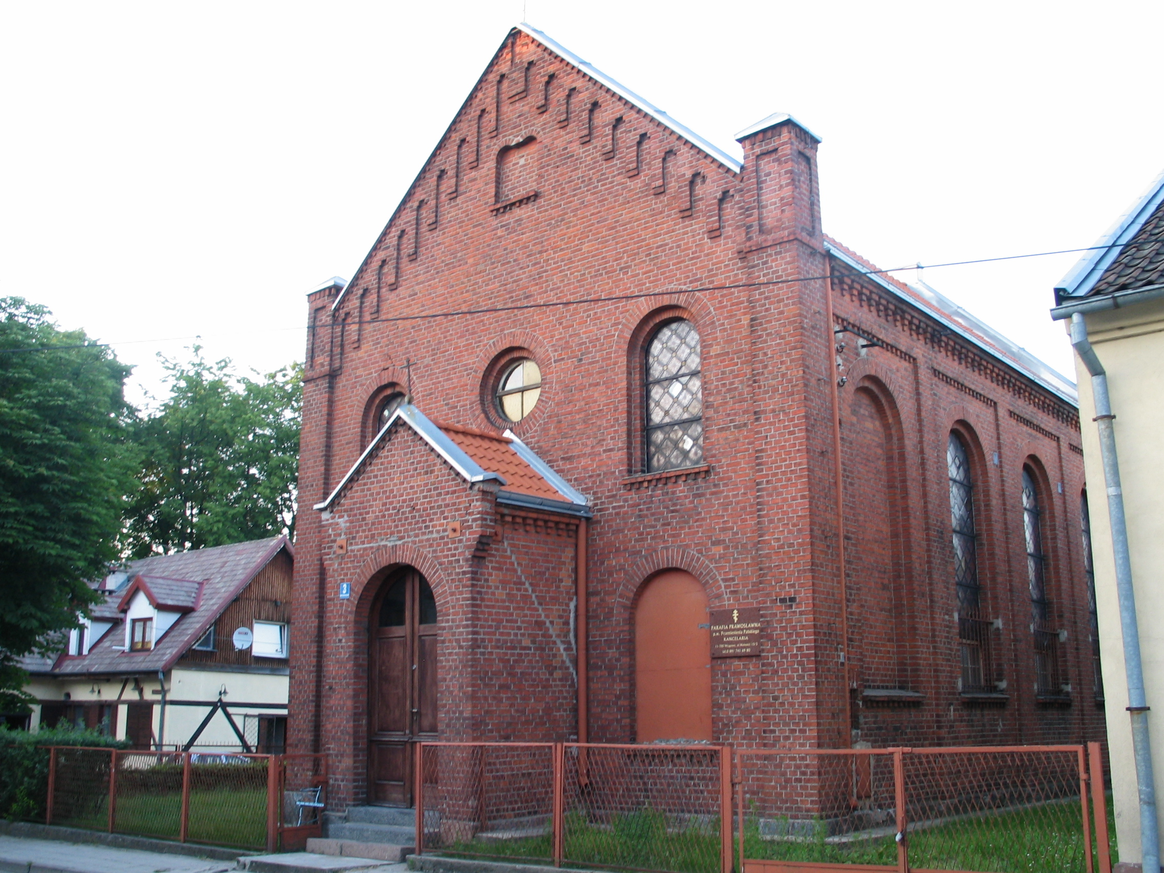 Mrągowo, ul. Roosevelta 3 - dawna synagoga i kościół baptystów, obecnie cerkiew prawosławna pw. Przemienienia Pańskiego (zabytek nr A-3878)